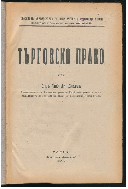 Търговско право от проф. Диков (1925 г.), издание на Свободния университет за политически и стопански науки (днес УНСС)